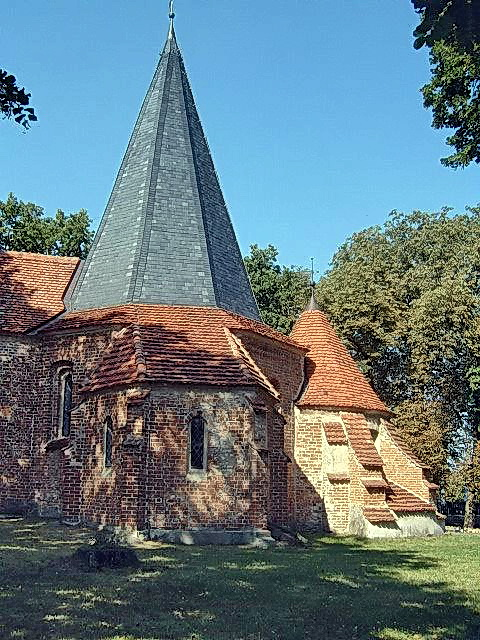 Kirche in Ludorf in Mecklenburg Vorpommern, etwa aus 1150, octogonaler Grundriss, erbaut von Ritter Wipert Morin